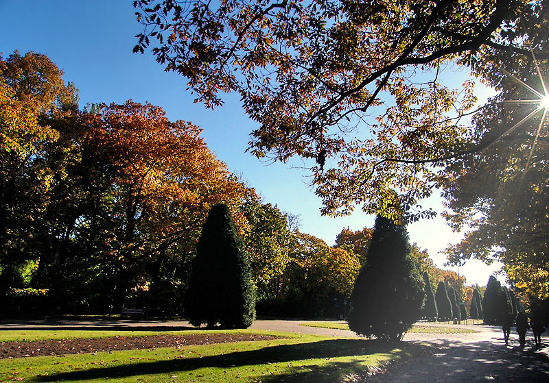 Białystok, ul. Mickiewicza / ul. Akademicka - Park Planty (zabytek nr A-137 z 18.12.1986)